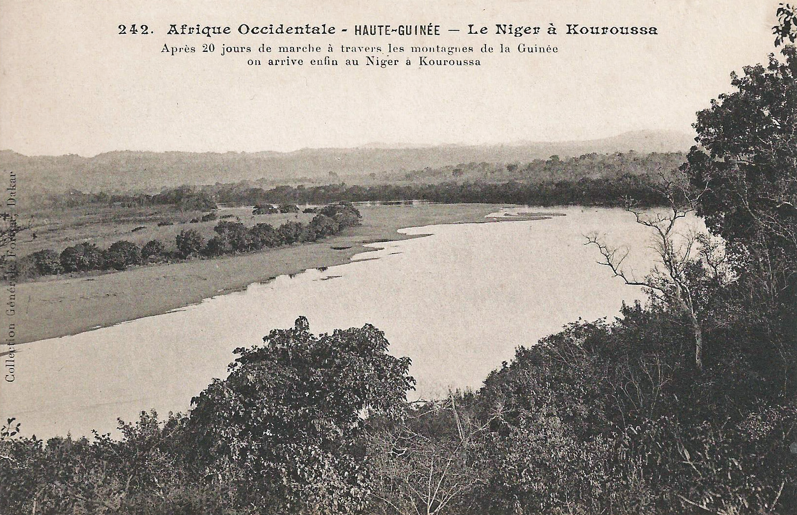 François-Edmond Fortier, Le Niger à Kouroussa. Afrique Occidentale. Haute-Guinée